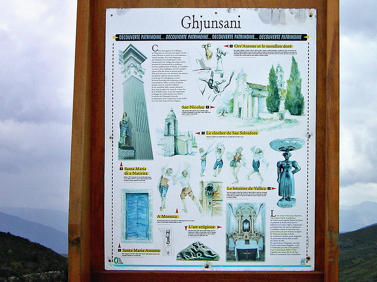 Olmi-Cappella (Corsica) - Panneau du Giunnsani